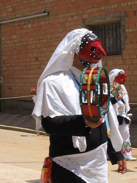 Danzante in Camuñas (Spain) Pecados y Danzantes